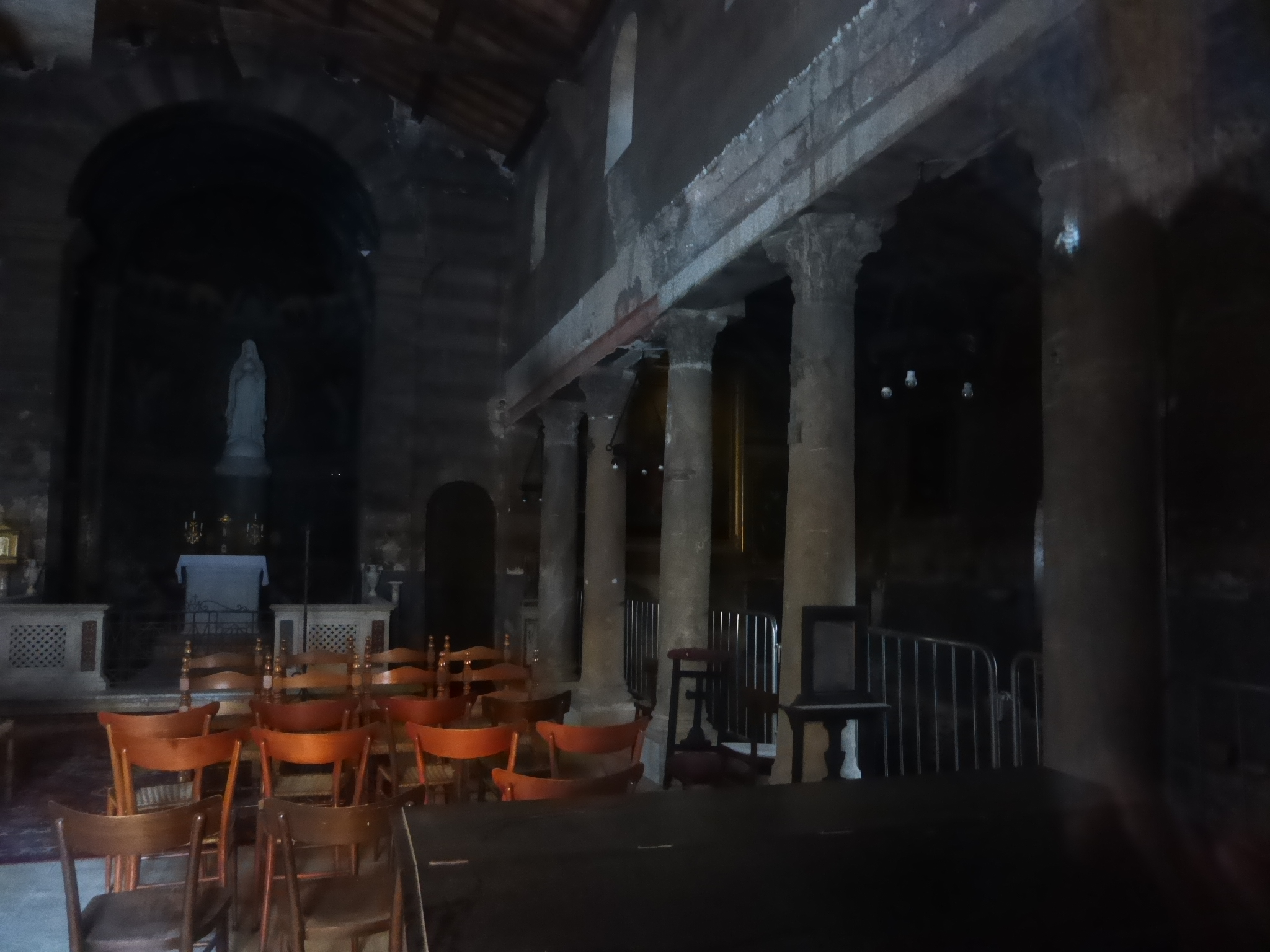 Roma, Santa maria in Cappella, interno (attraverso il vetro)